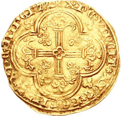 Турский ливр. Реверс